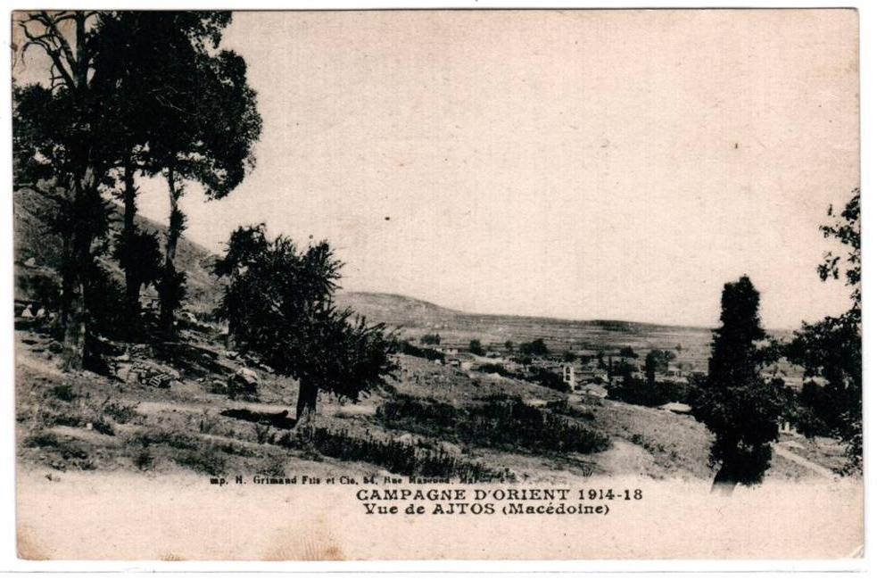 Битолската гара през Първата световна война. Съглашенска пощенска картичка